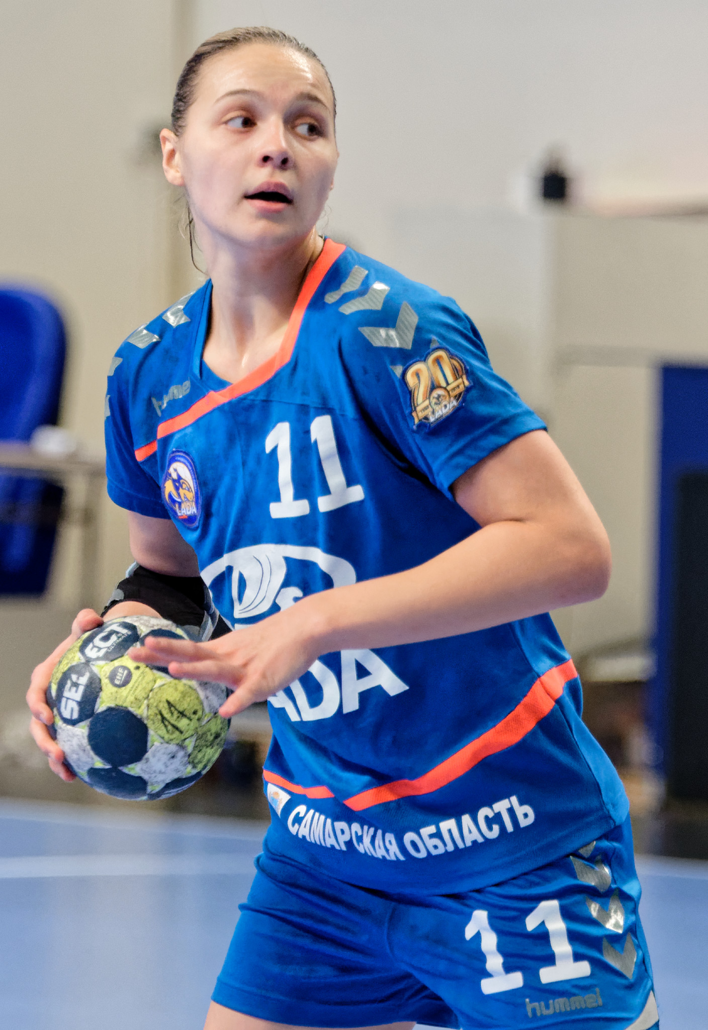 Match de coupe EHF entre Issy Paris Hand et les russes de Lada Togliatti. A Coubertin, le 12 janvier 2018.